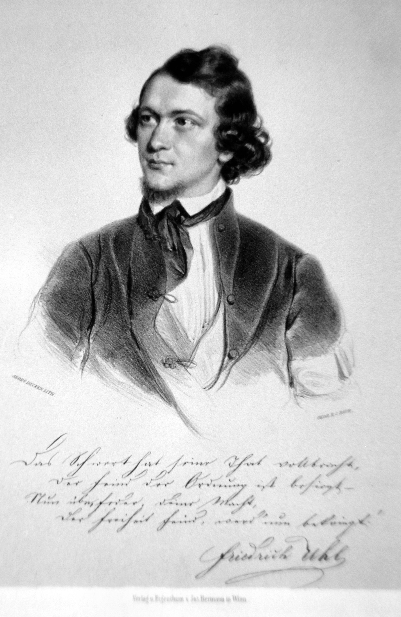 Friedrich Uhl (1825-1906), österreichischer Schriftsteller, Jurist. Lithographie von Georg Decker, ca. 1848